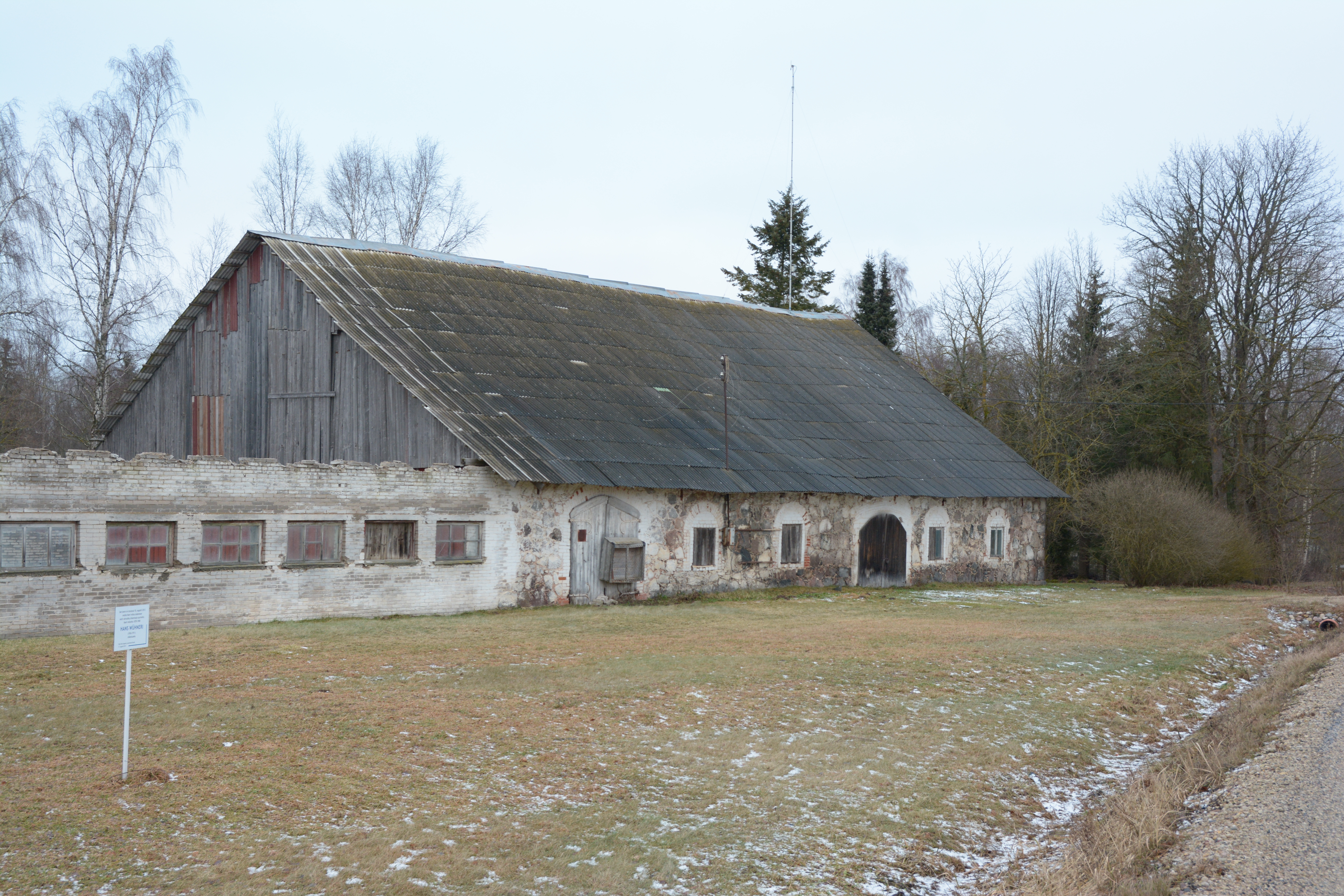 Keeri mõisa kõrvalhoone 2018. aastal